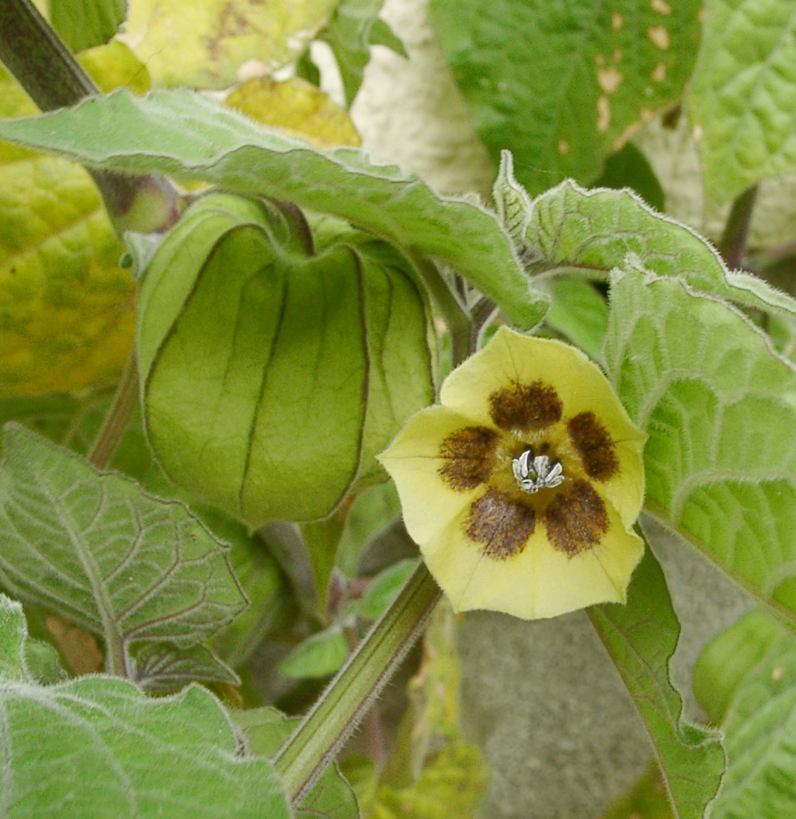 Blüte von Physalis peruviana